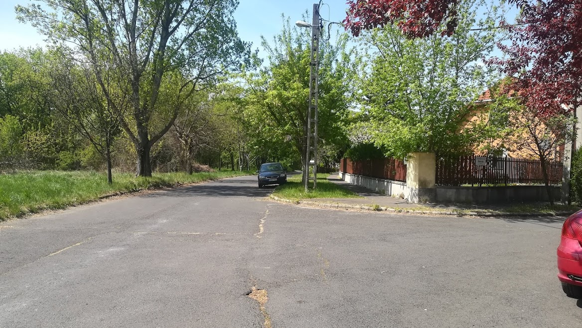 A Karánsebes és a Borsa utca kereszteződése Gubacsipusztán.